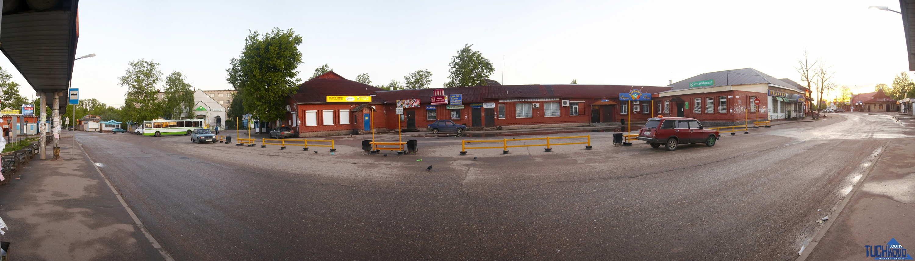 Панорама Привокзальной площади Тучкова